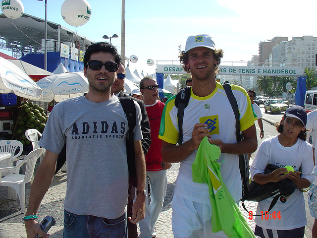 Gustavo Kuerten, o Guga.